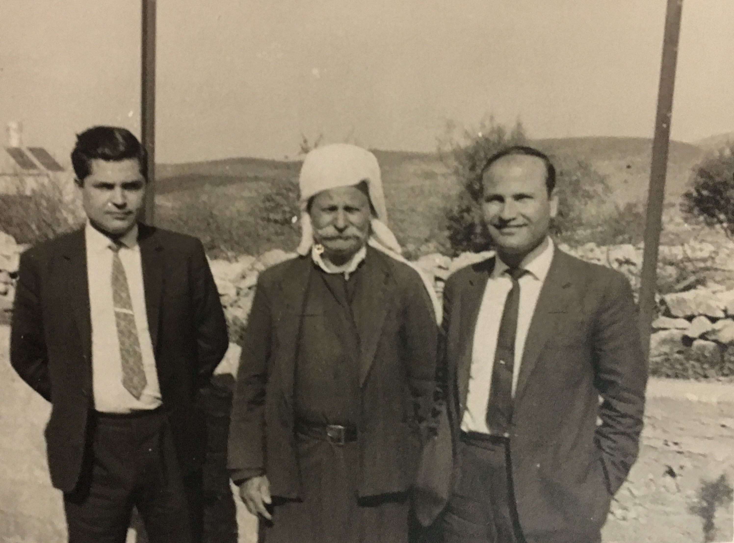 סלמאן אביו ואחיו פארס בכפר סמיע